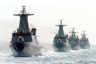 Patrullajes de la Fuerza Naval de la Armada de México en costas del Pacífico mexicano.